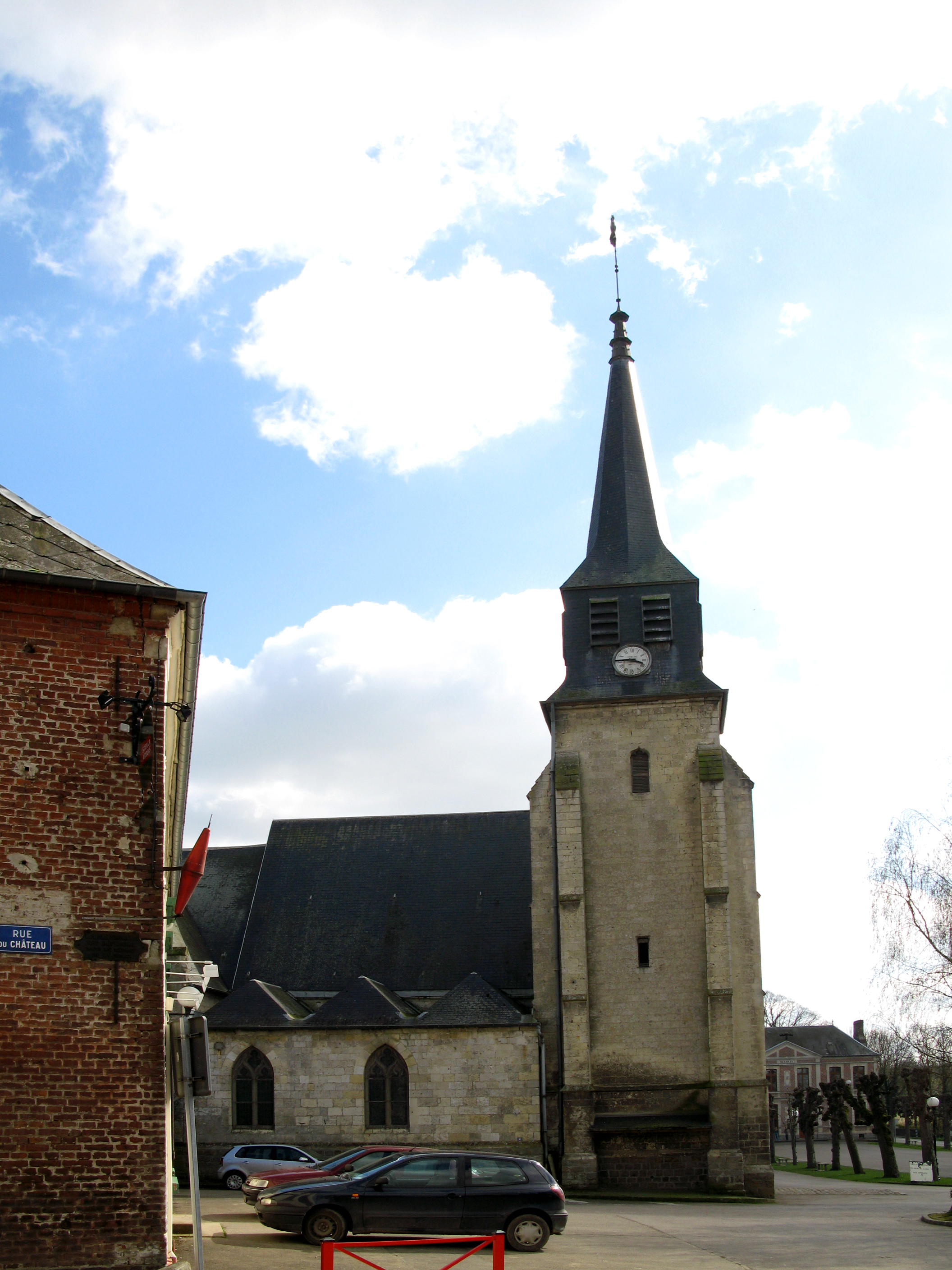 Contay (Somme, France) - L'église (façade Nord).